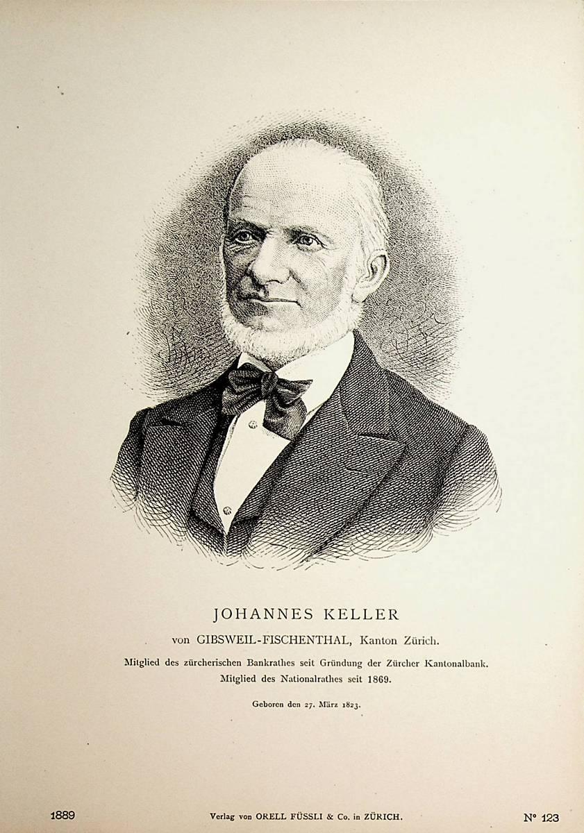 Johann Jakob Keller, Fischenthal ZH, Schweiz